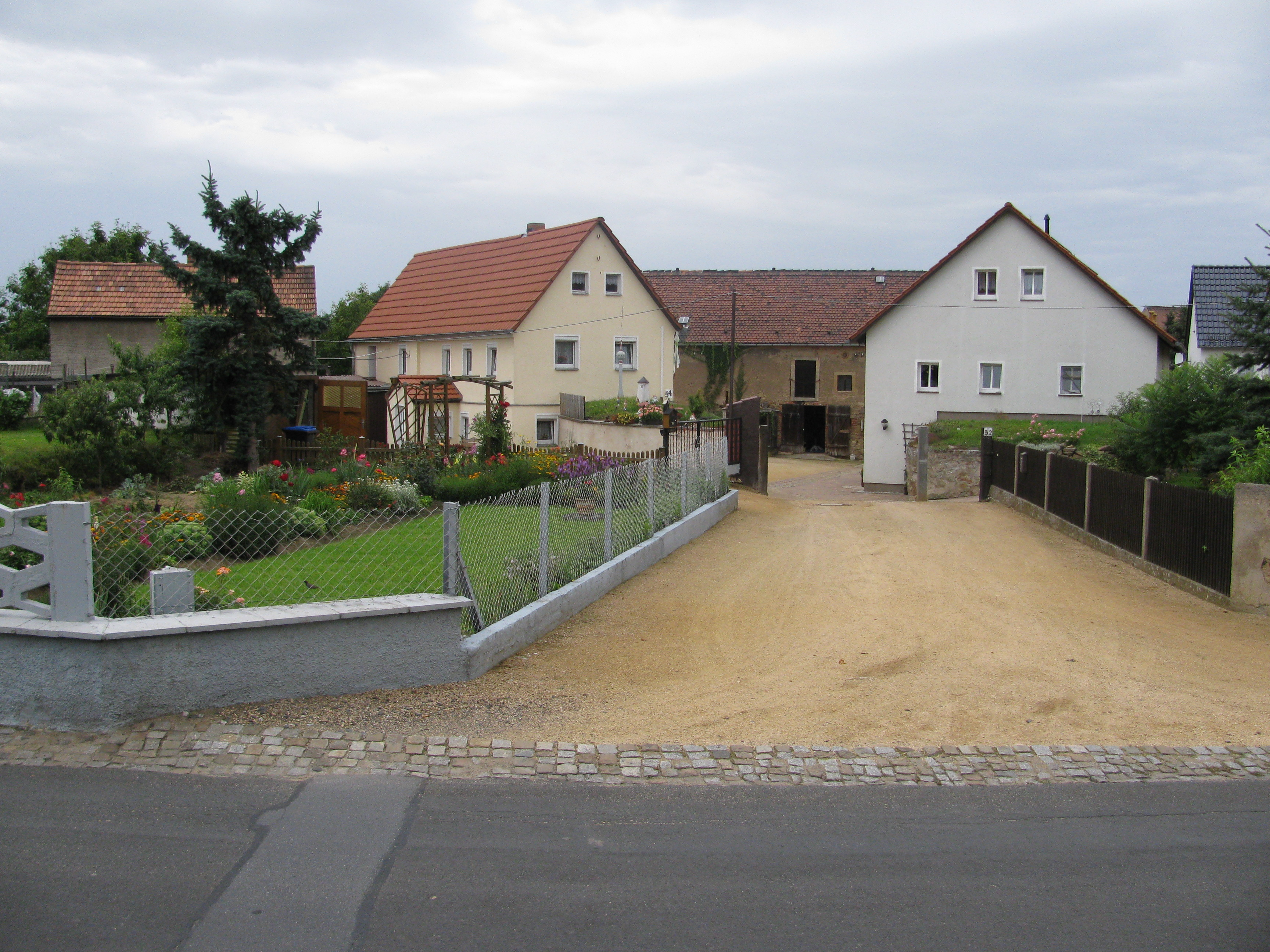 Bauernhof in Steinbach, Gemeinde Moritzburg, Sachsen